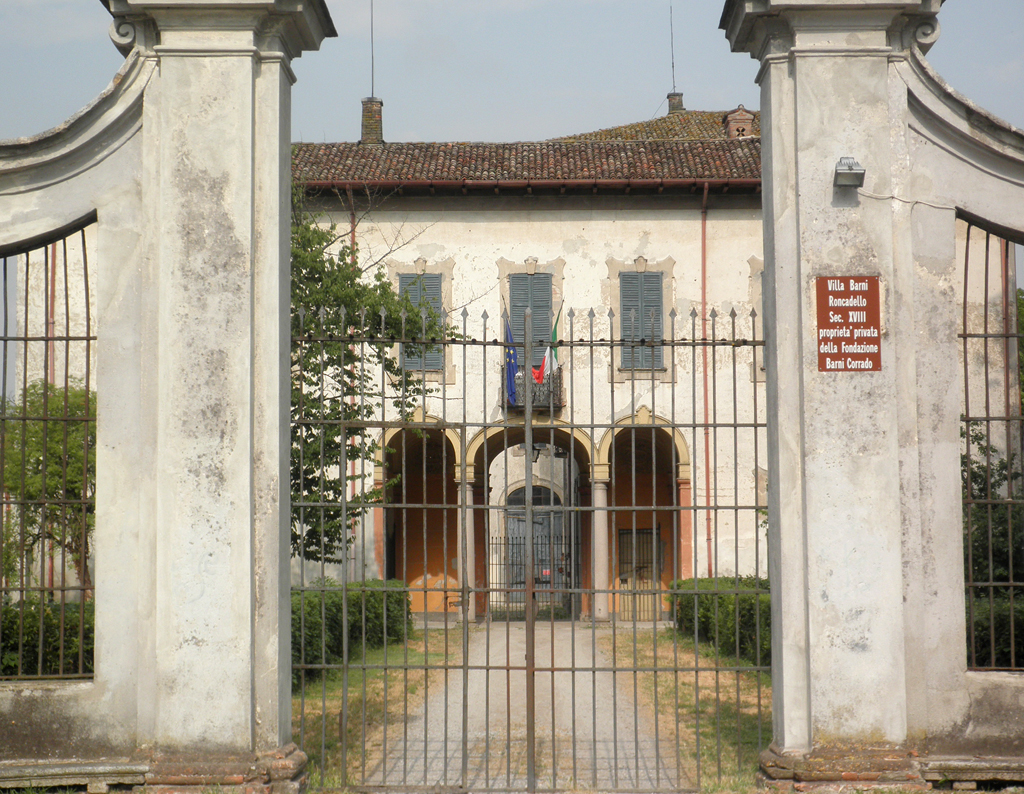 Ingresso laterale a Villa Barni a Roncadello, fraz. di Dovera